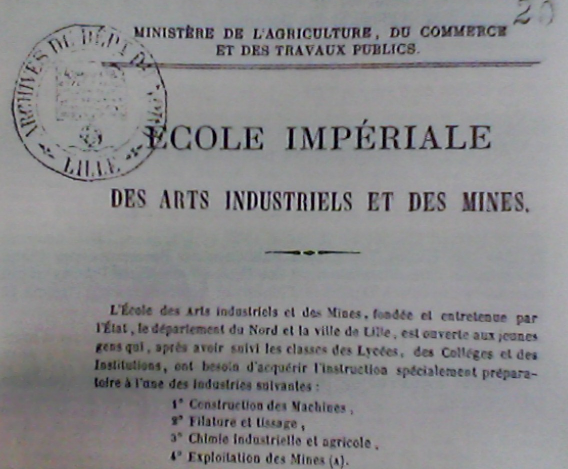 École impériale des arts industriels et des mines de Lille (École Centrale de Lille) - 1860 -- De l'Organisation de l'enseignement industriel et de l'enseignement professionnel, Morin Tresca